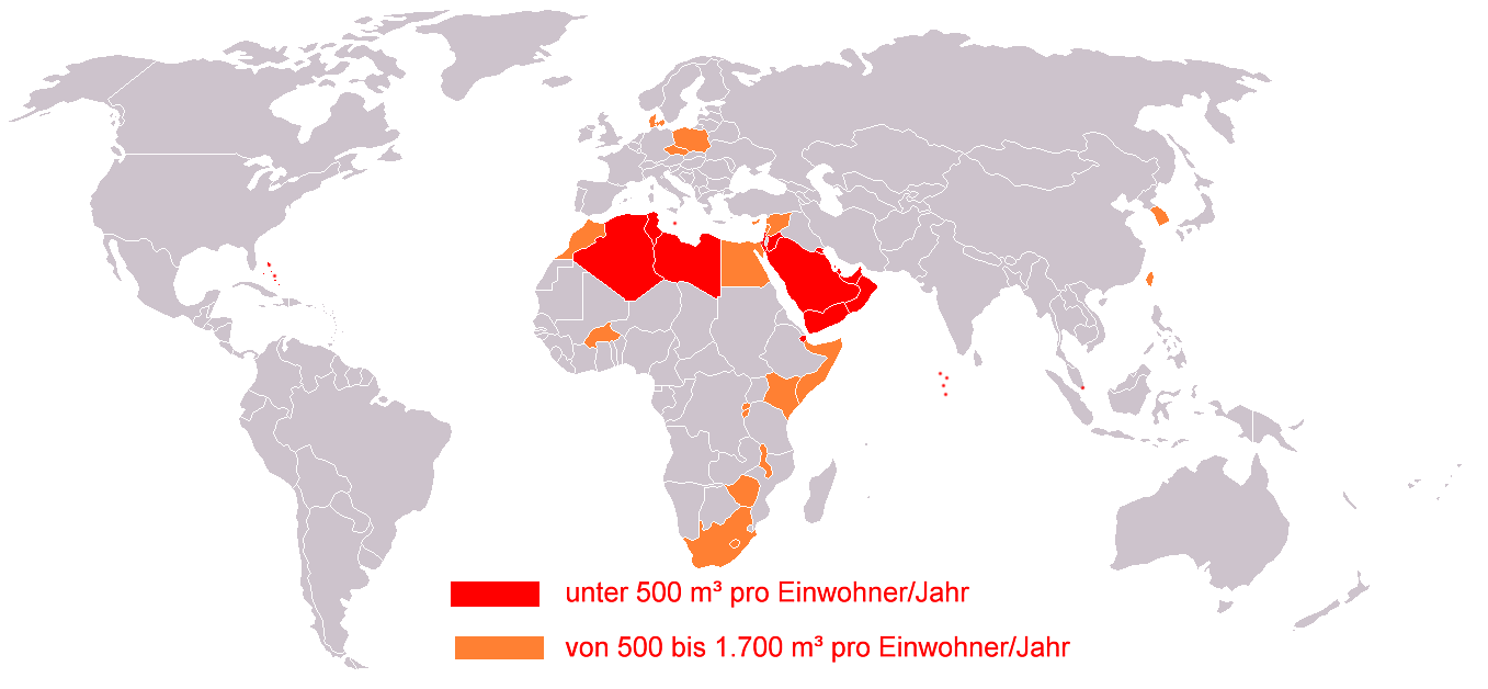 Karte der weltweit geringsten Verfügbarkeit an sich erneuerndem Süßwasser pro Einwohner und Jahr in m³ St. Krekeler